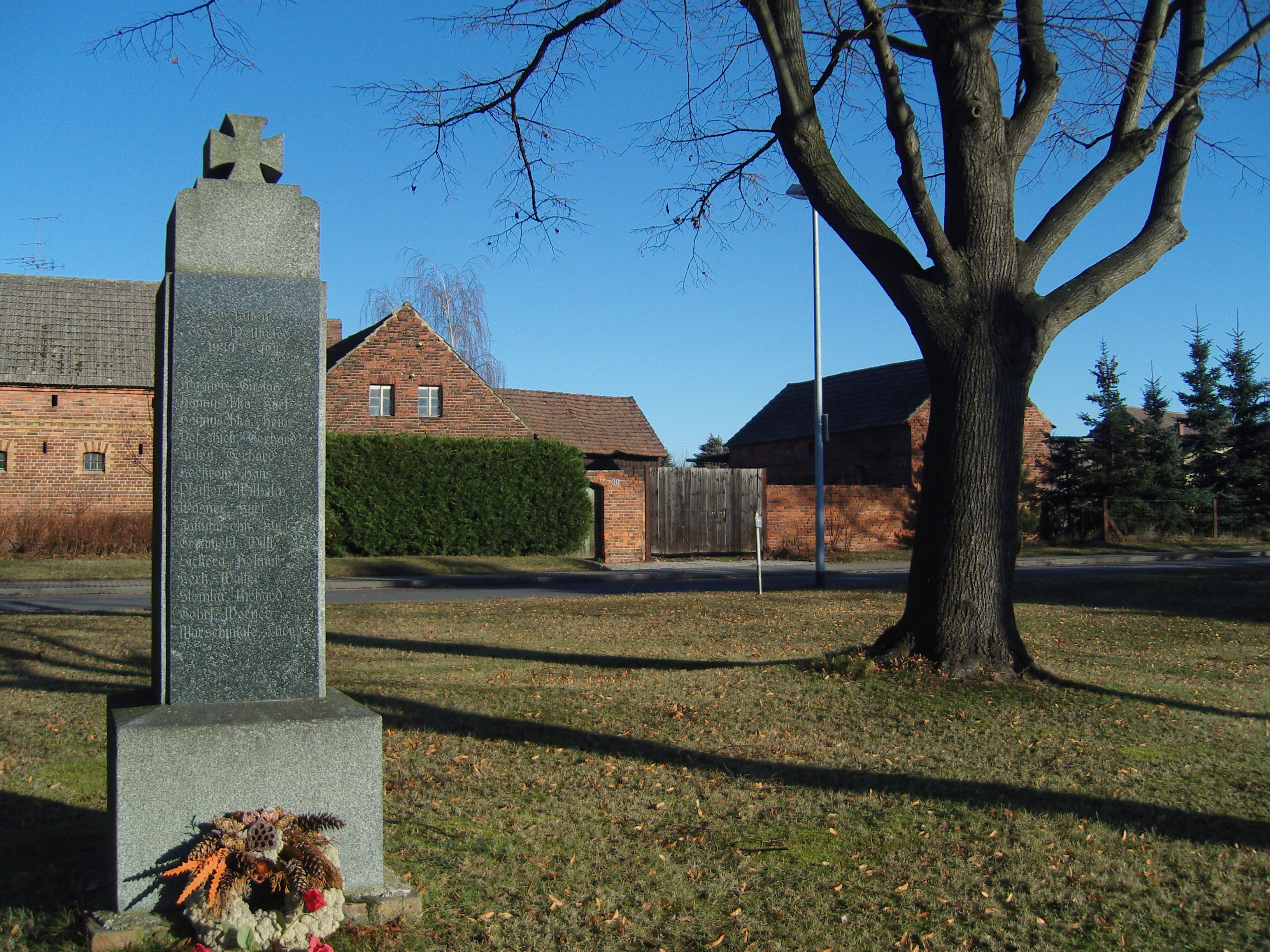 Kriegerdenkmal für die Gefallenen des Ersten Weltkriegs in Lieske, Niederlausitz. Im Hintergrund ein denkmalgeschütztes Bauerngehöft an der Dorfstraße 30.